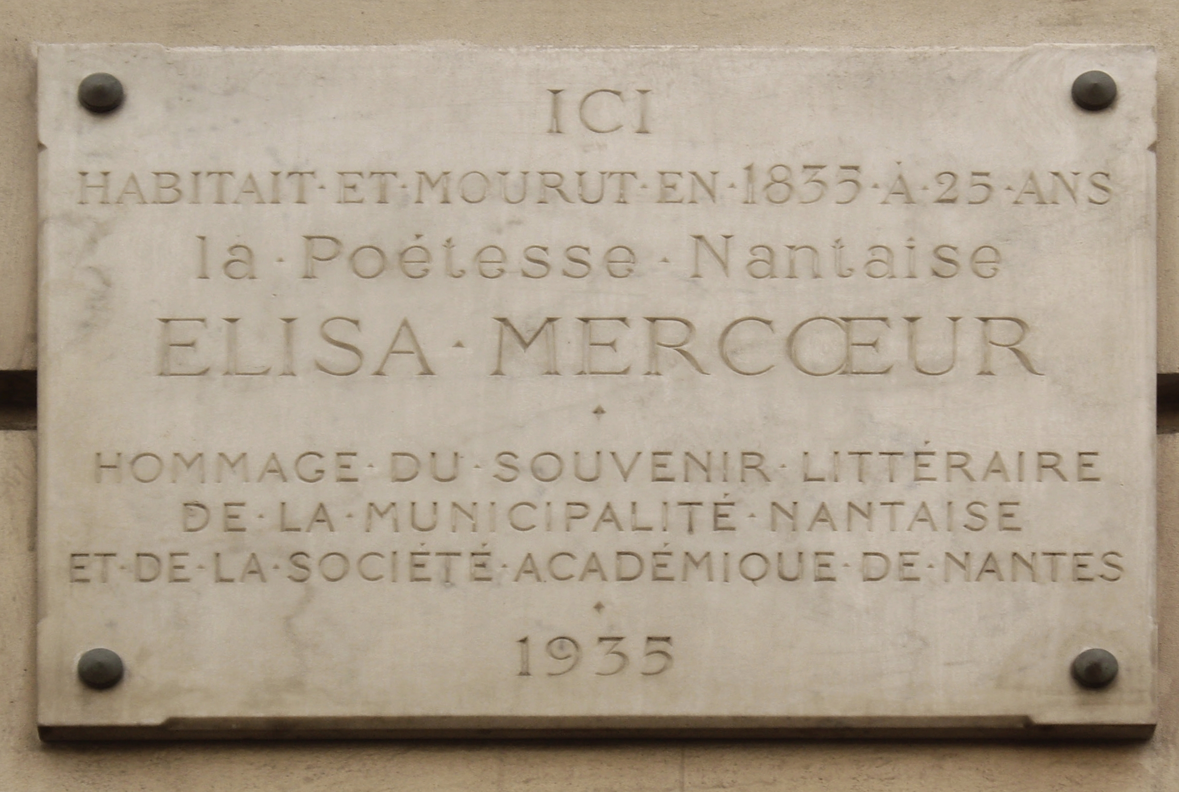 Plaque apposée au n° 43 de la rue du Bac, Paris 7e, où habita la poétesse Élisa Mercœur (1809-1835) et où elle est morte le 7 janvier 1835.